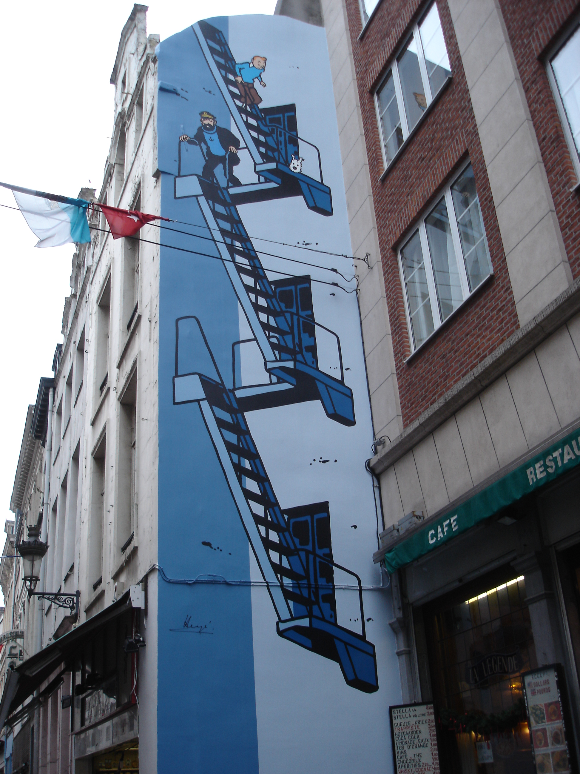 Tim-und-Struppi-Wandgemälde in der Rue de l’Etuve in Brüssel (Parcours Bande Dessiné)[1]: Die Hauptfiguren Tim, Haddock und Struppi fliehen über eine Feuertreppe. Die Szene stammt aus dem Band Der Fall Bienlein[2]